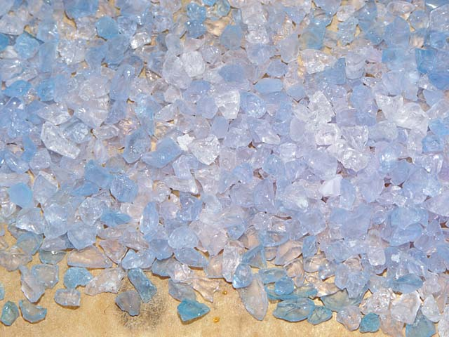 Erschöpftes Silicagel mit Indikatormittel beim Trocknen